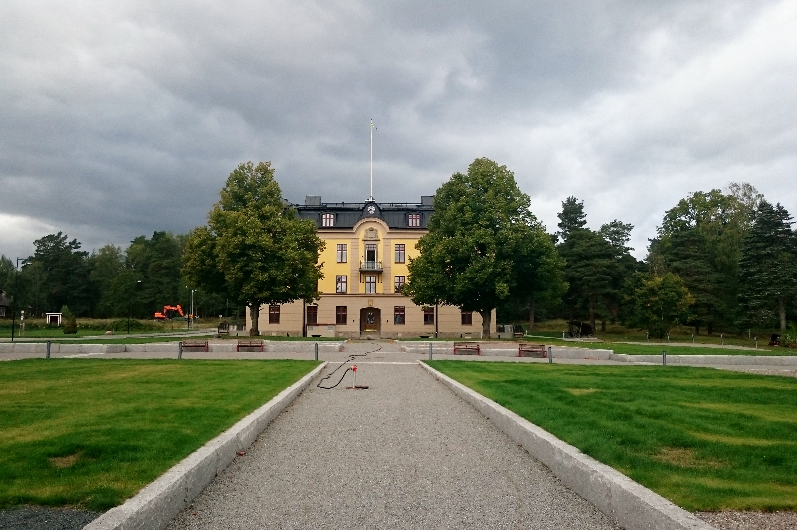 Före detta kanslihuset vid Vaxholms grenadjärregemente (1906–1927), Göta livgardes fästningsbataljon (1928–1939), Vaxholms kustartilleriregemente (1941–2000), Vaxholms amfibieregemente (2000–2005).